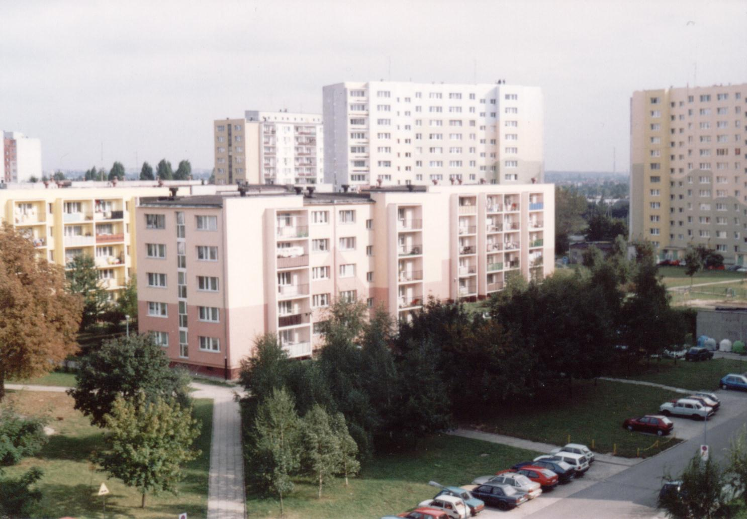 View Retkinia